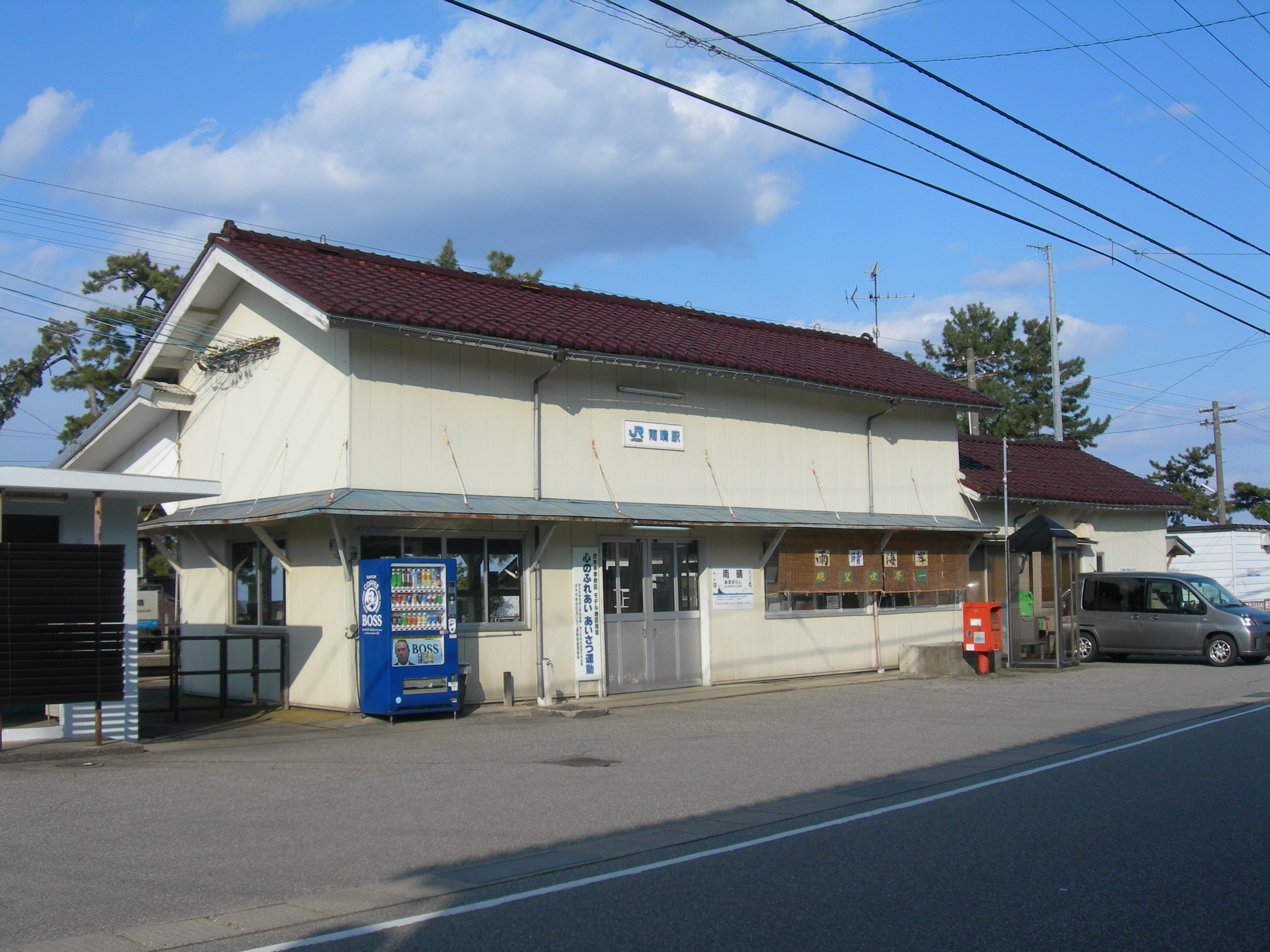 雨晴駅